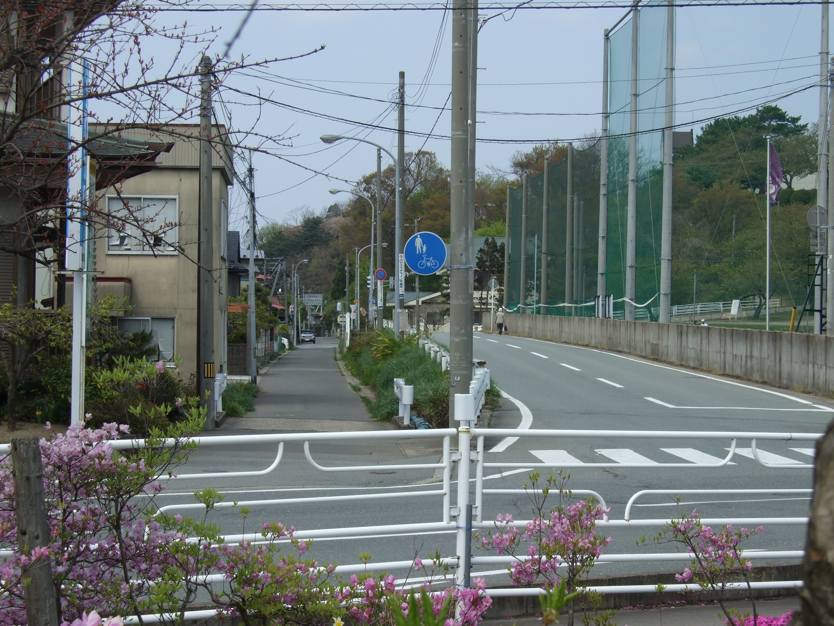 秋田県道401号雄和仁別自転車道線（仁別サイクリングロード） (Akita prefecture route #401)